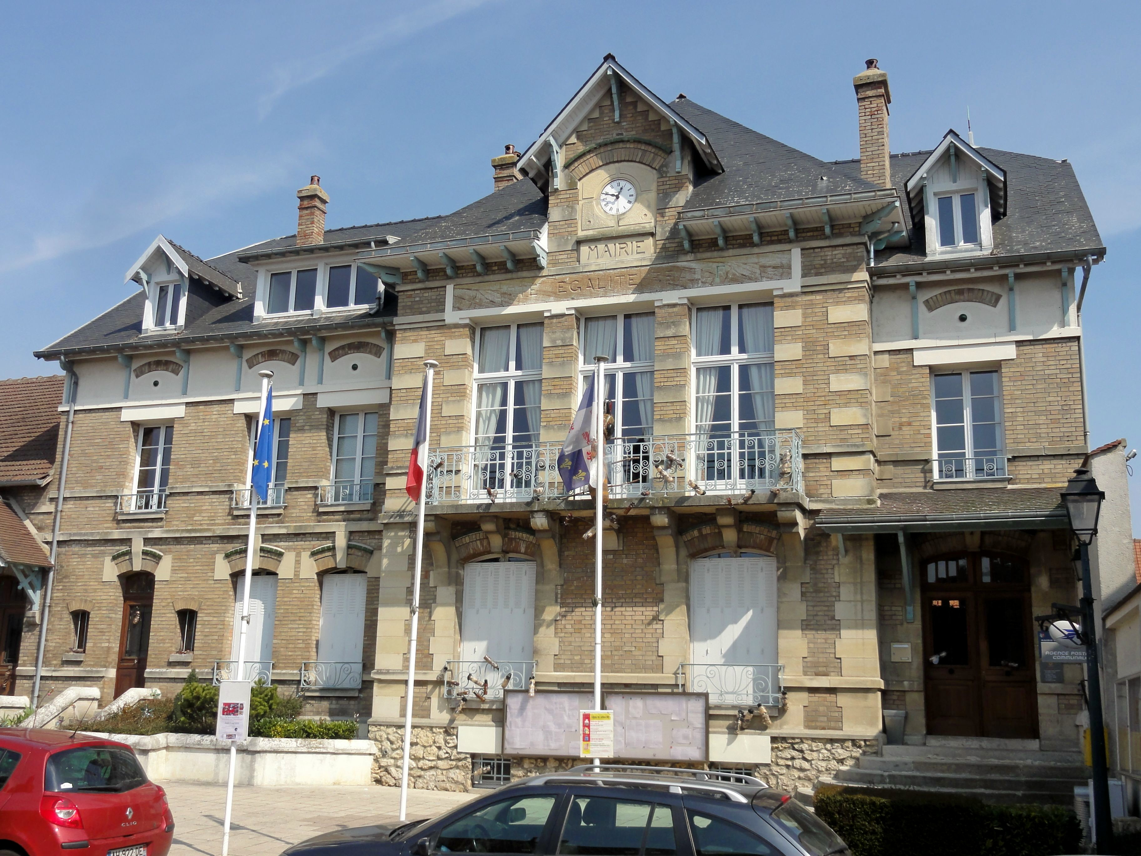 Mairie, rue de la République.